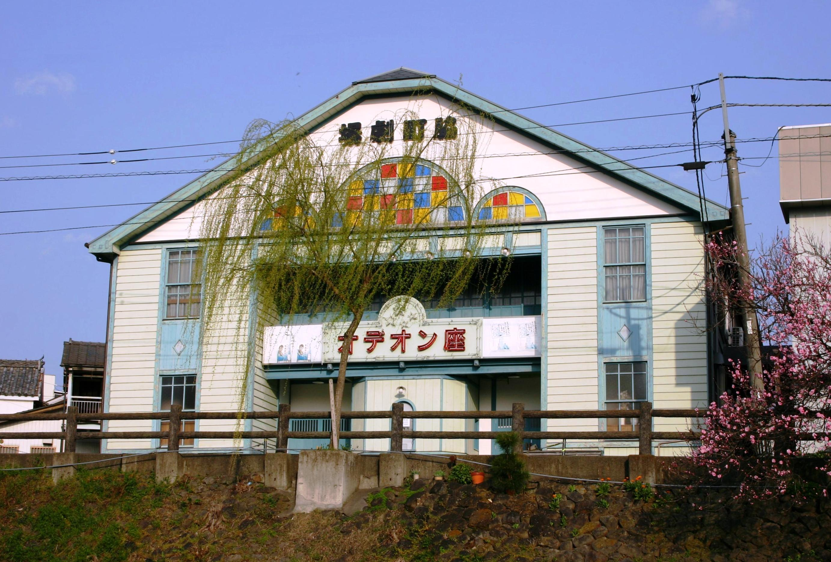 The Odeonza in Waki-machi, Mima-shi, Tokushima-ken, Japan